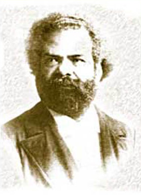 Retrato de Crispim do Amaral.